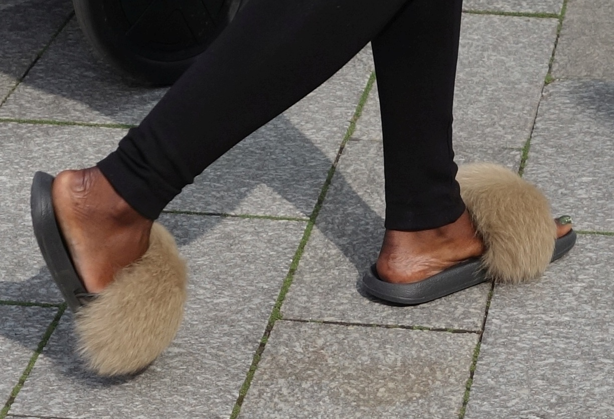 Blaufuchs-Sandalen, Königsallee, Düsseldorf, August 2019.